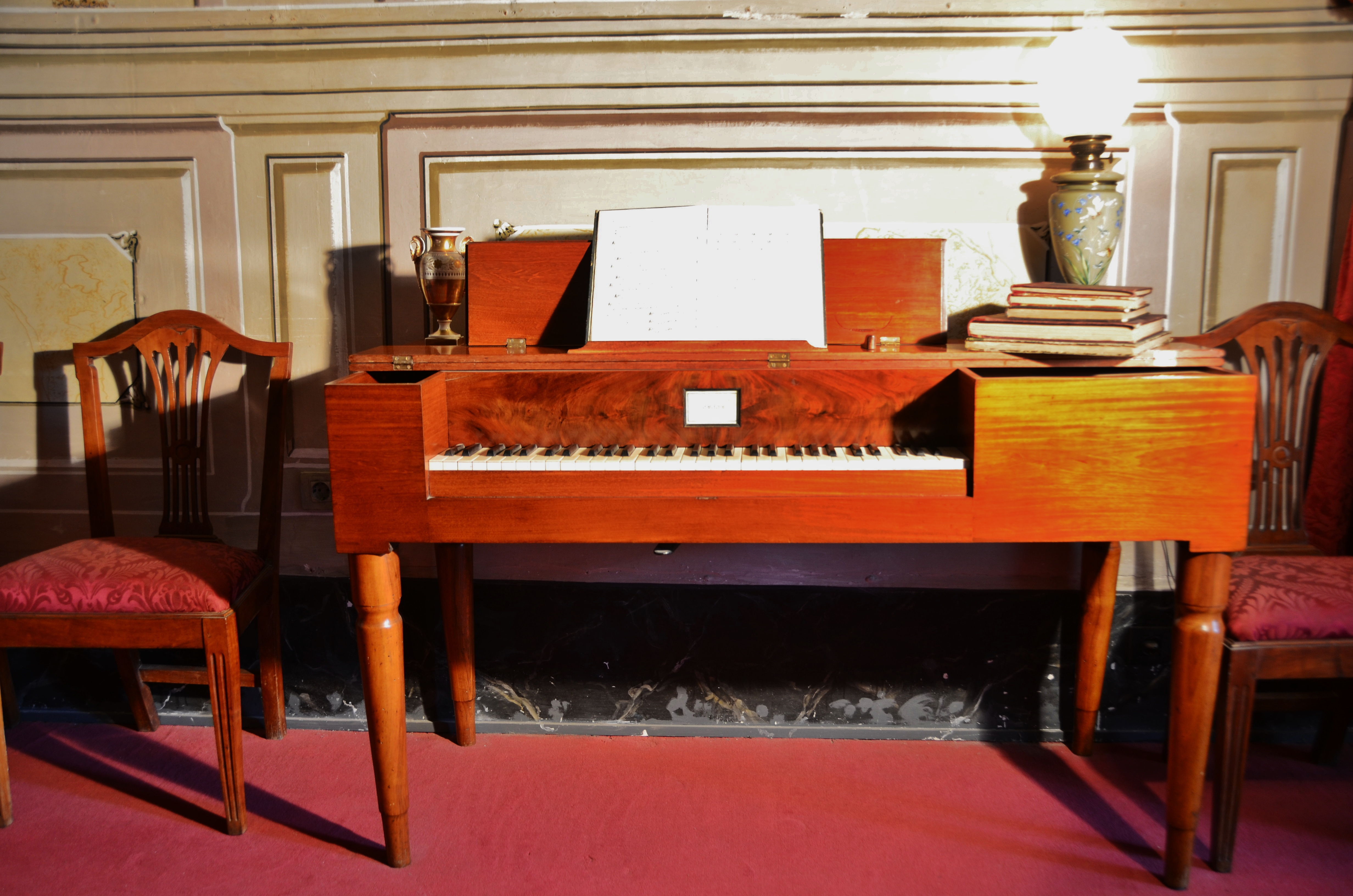 Interior de la Sala de Música del Museu Romàntic Can Papiol, Vilanova i La Geltrú (Catalonia).